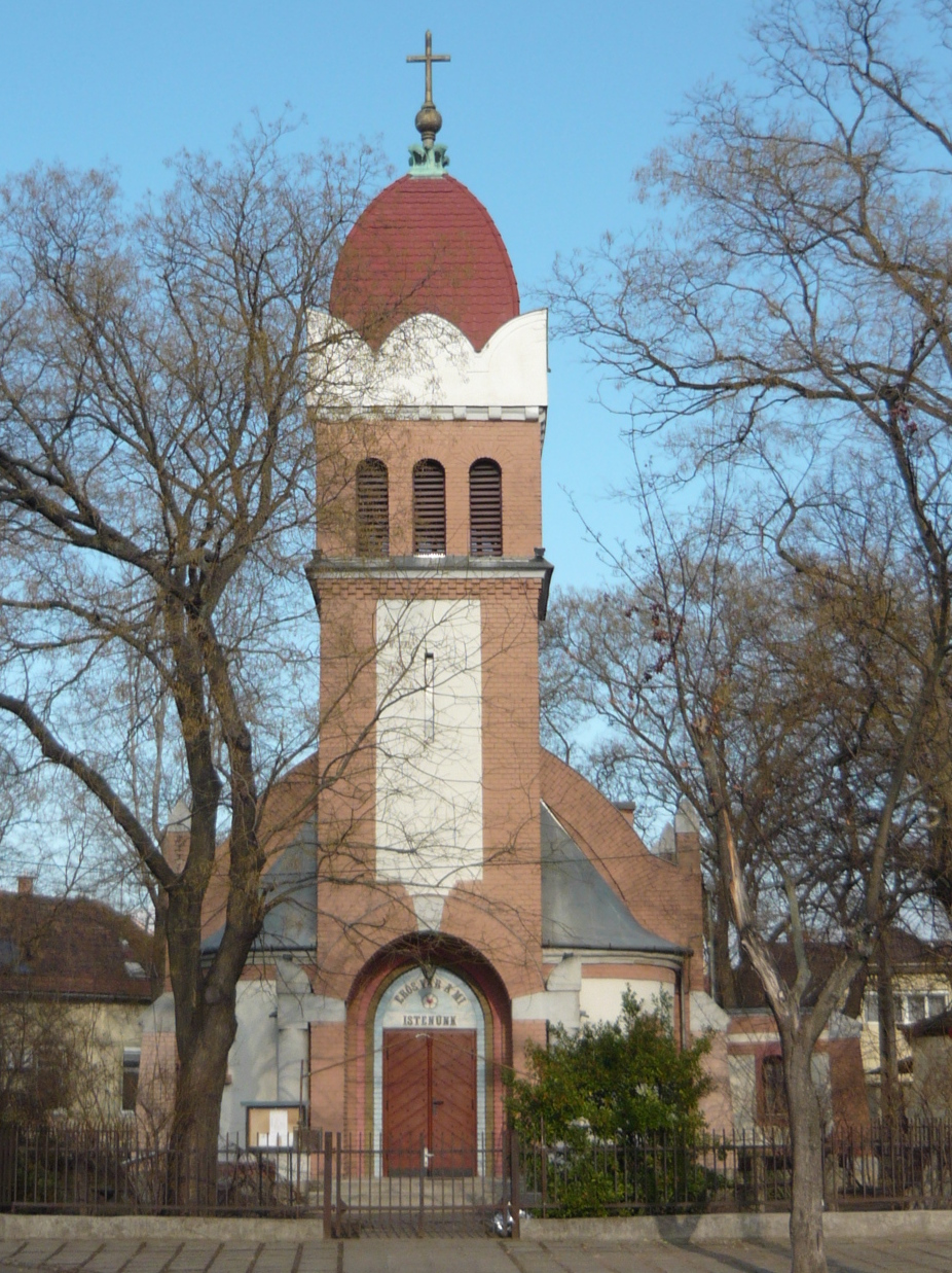 Lutheran Church in Pestújhely, Budapest